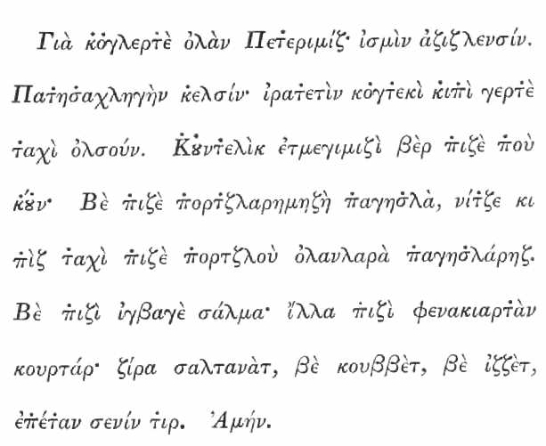 Vater Unser in karamanischer, d. h. griechischer Schrift mit diakritischen Zeichen. Die Sprache ist Türkeitürkisch mit südanatolischen Spuren. Aus osmanischer Zeit.